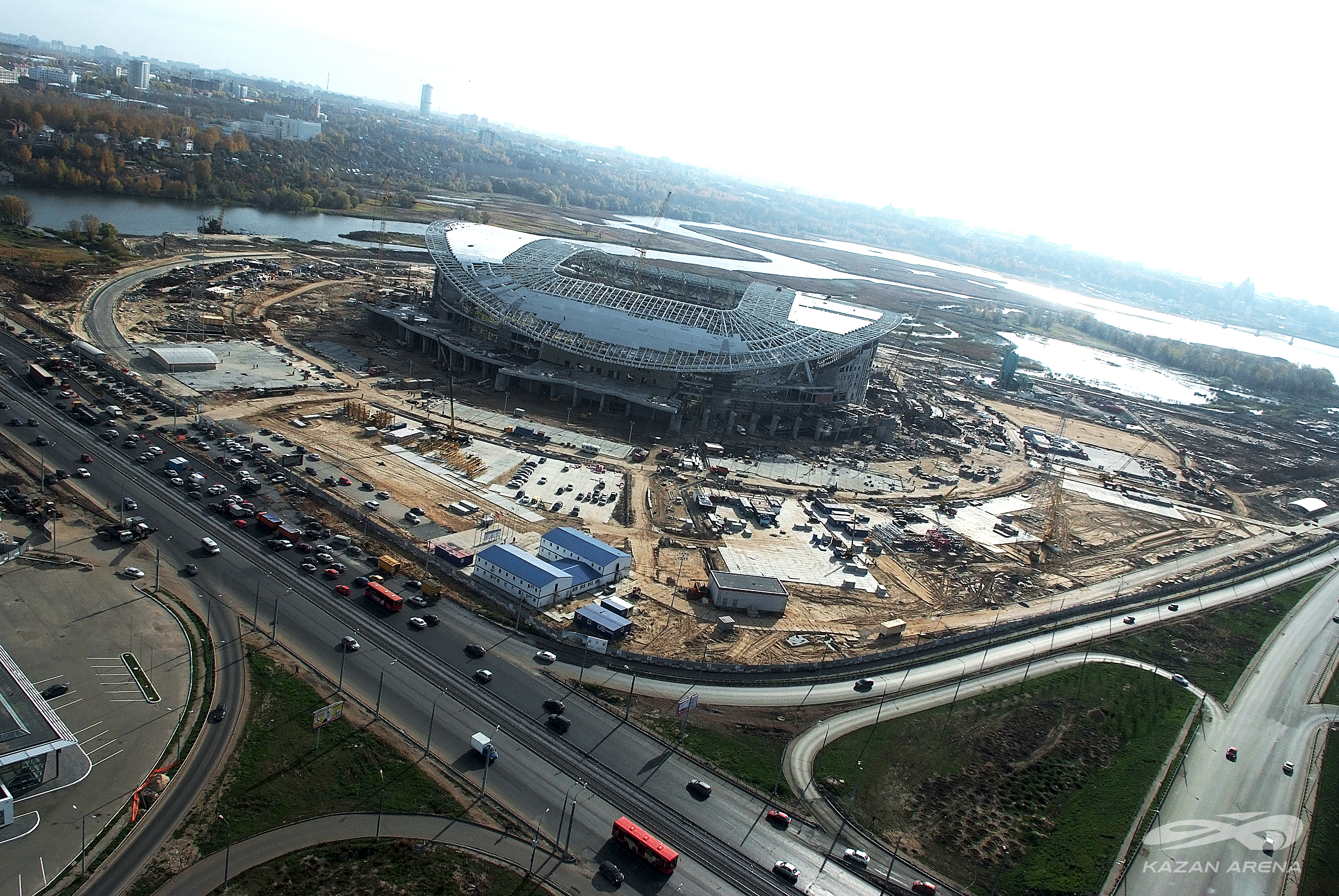 Вид на строящийся стадион Казань Арена